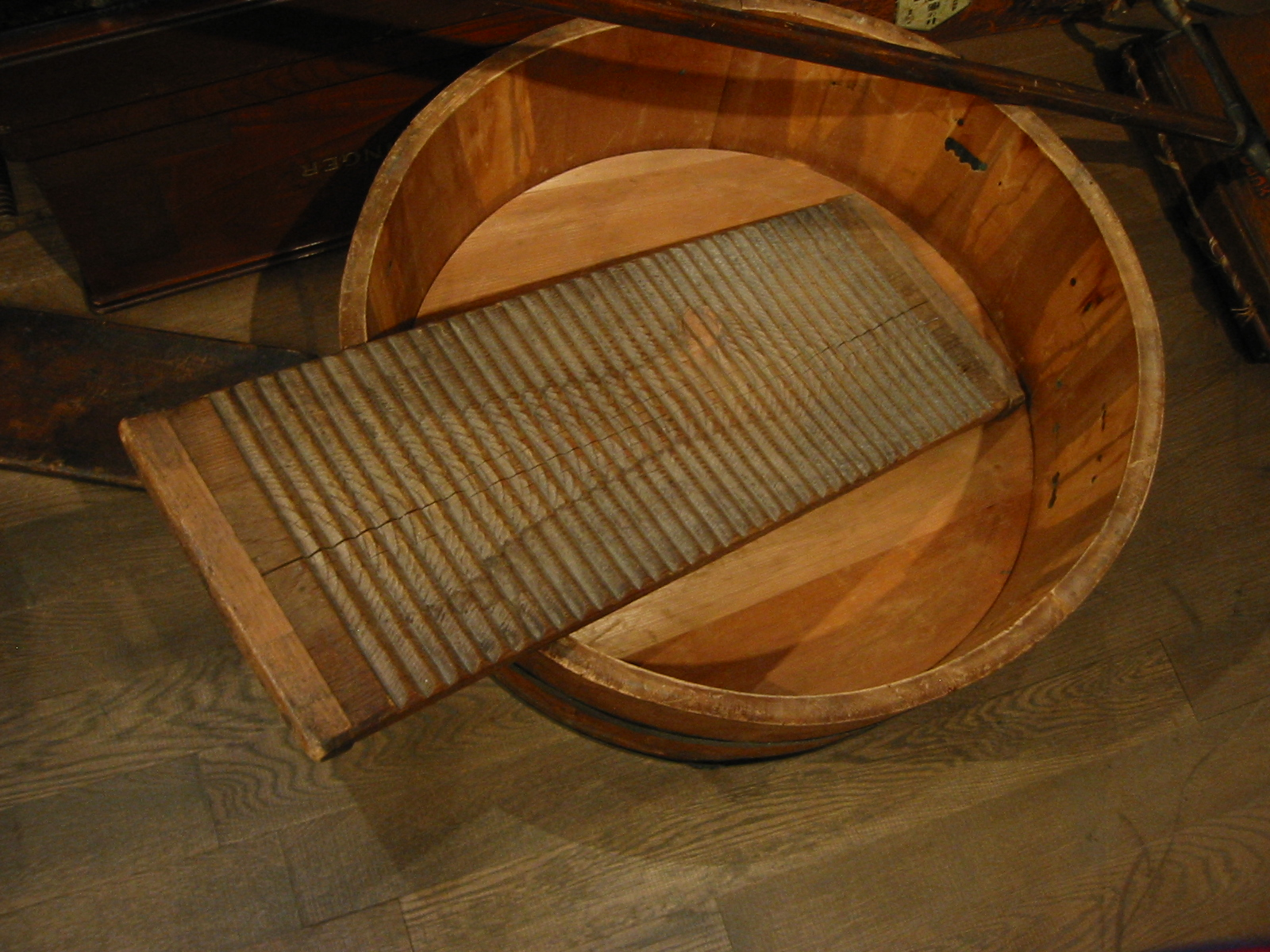 神戸甲南、武庫の郷にて、たらい と 洗濯板